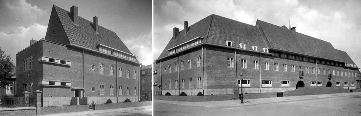 Montage van twee foto's van de nieuwbouw van het klooster van de Zusters Franciscanessen van Heythuysen, Sint Maartenspoort 2, Wyck-Maastricht. Fotocollectie RHCL Maastricht, GAM 1054 & 1055. De montage van KLeon3 maakt gebruik van 2 afbeeldingen op Wikimedia met een vrije licentie: File:Maastricht-Wyck, Klooster Franciscanessen van Heythuysen, 1932 (1).jpg File:Maastricht-Wyck, Klooster Franciscanessen van Heythuysen, 1932 (2).jpg